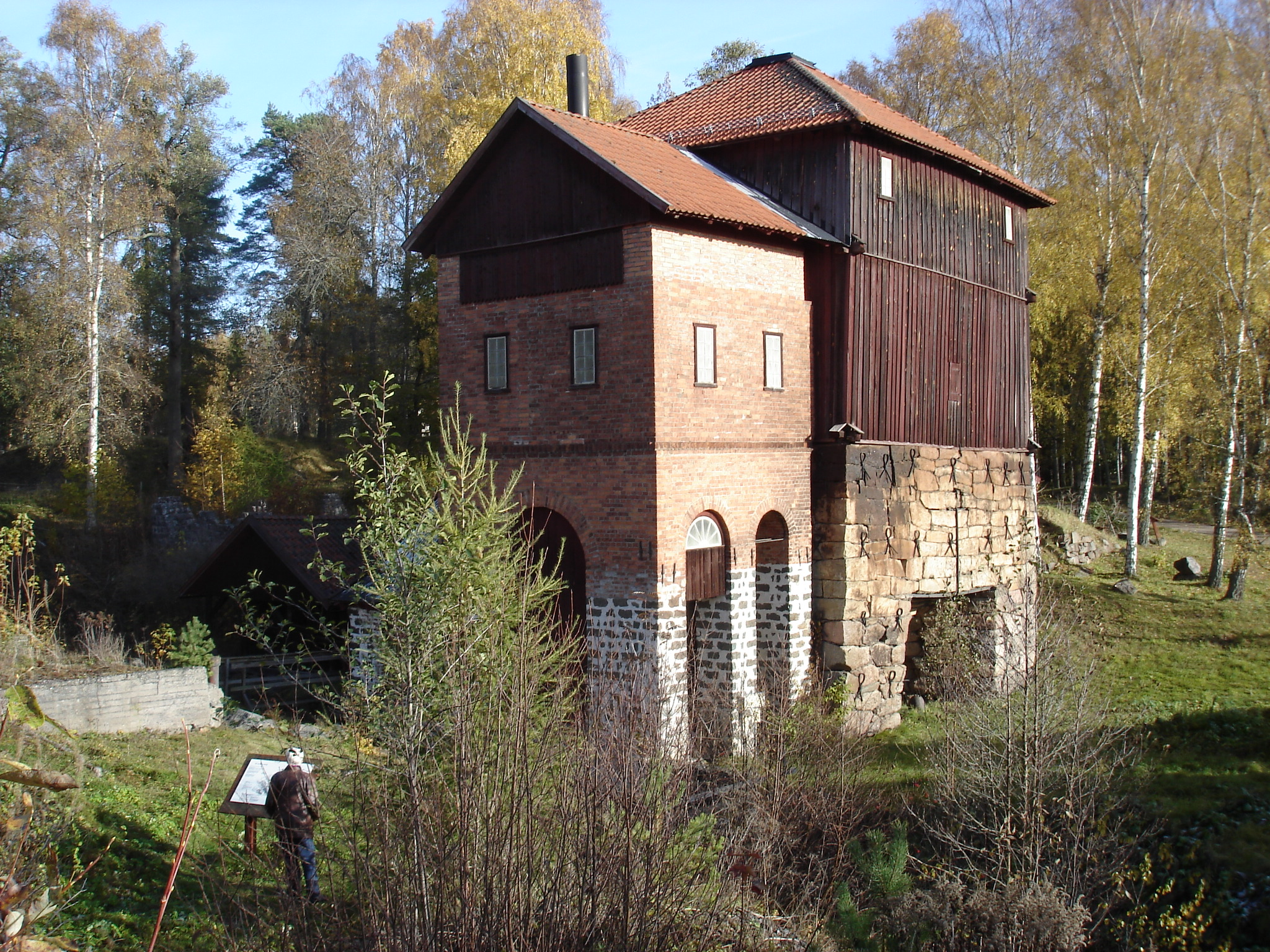 Byggnaden sedd från slagghögarna väster om masugnen.